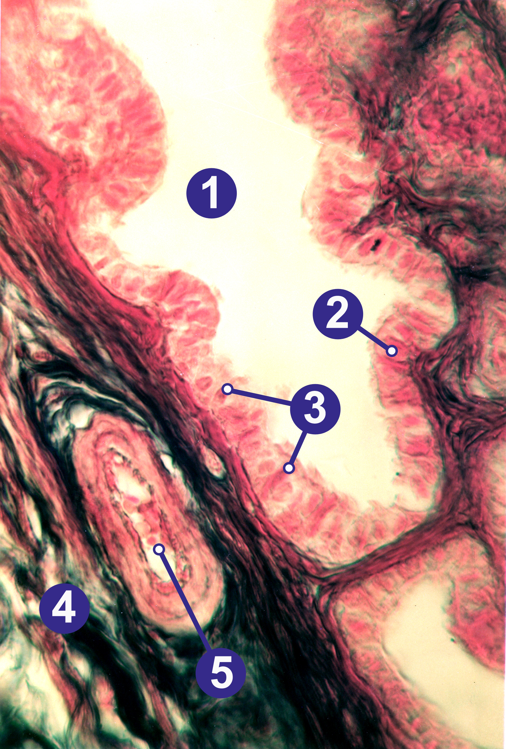 Querschnitt eines menschlichen Eileiters (Tuba uterina), Zyklusmitte. Azan-Färbung, Gelbfilter, Objektiv 280x:(1) Lumen, (2) hochprismatisches Flimmerepithel mit Kinozilien, (3) Drüsenzellen, (4) Tunica muscularis, (5) Arteriole